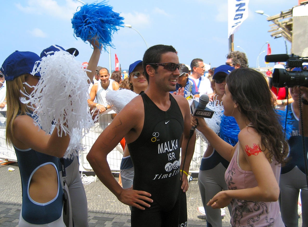 יונתן מלכא